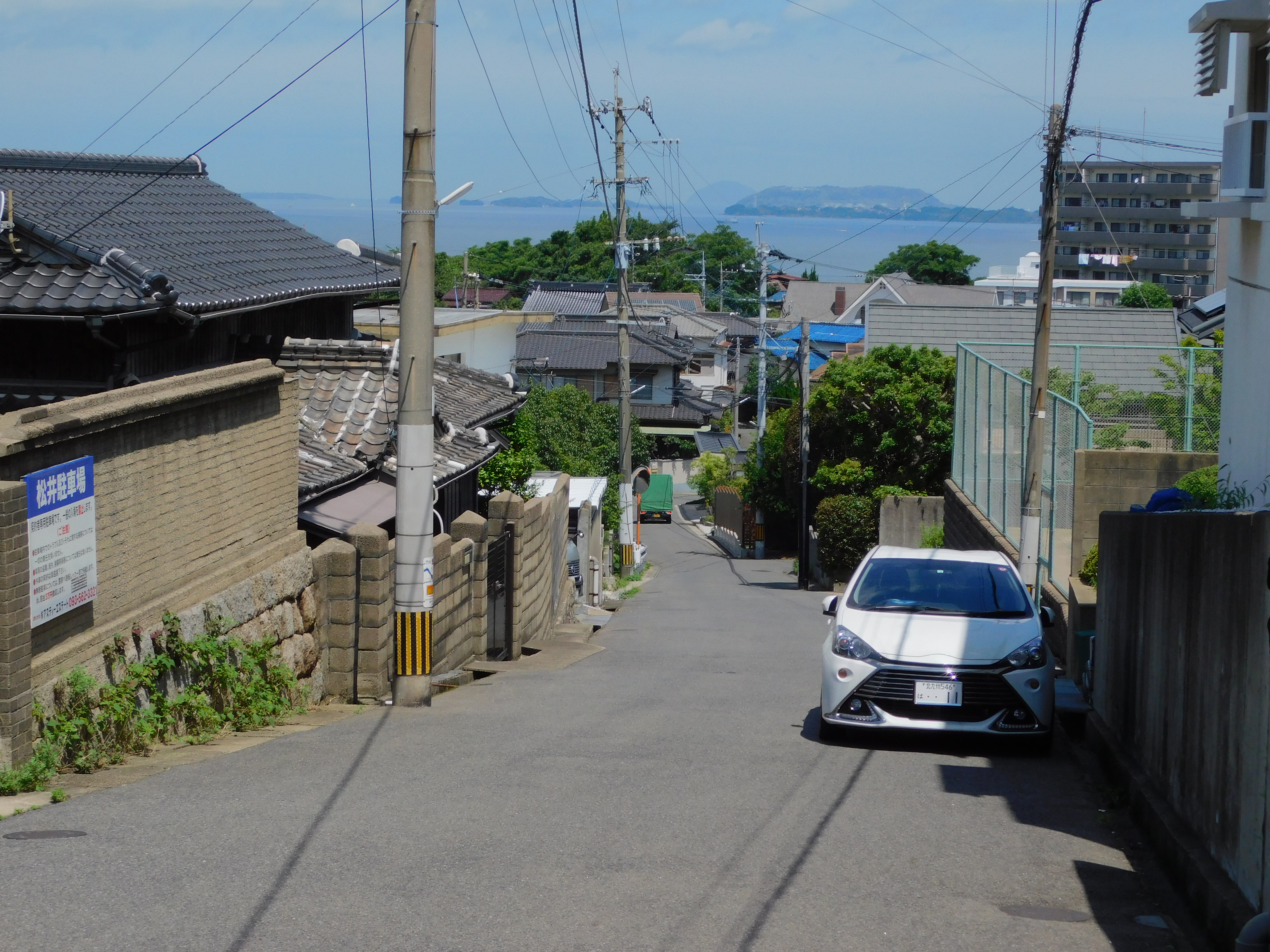 2019年7月25日